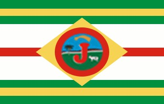 Bandeira de Jesúpolis, Goiás, Brasil